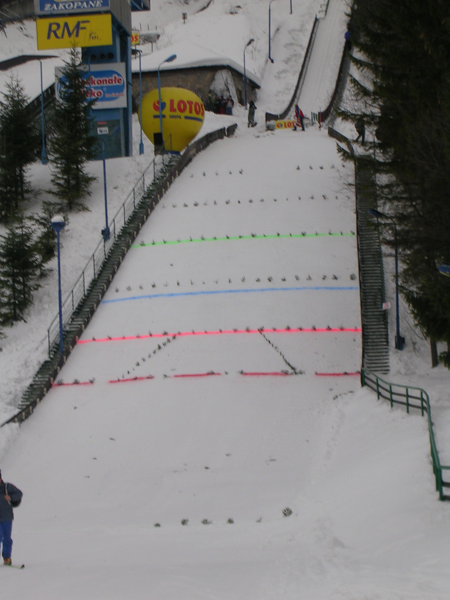 Zdjęcie przedstawiające skocznię K-35 w Zakopanem